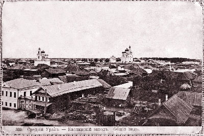 Каслинский завод. Общий вид. XIX в.